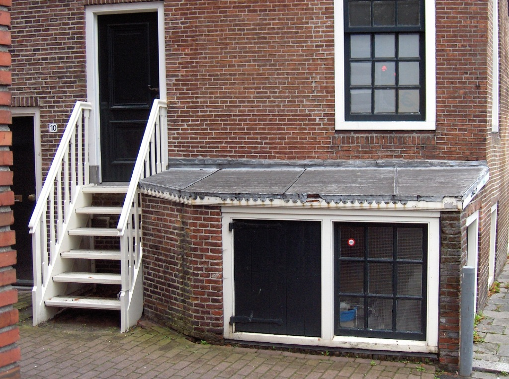 Potkast aan de Turfsingel 10 in de stad Groningen.